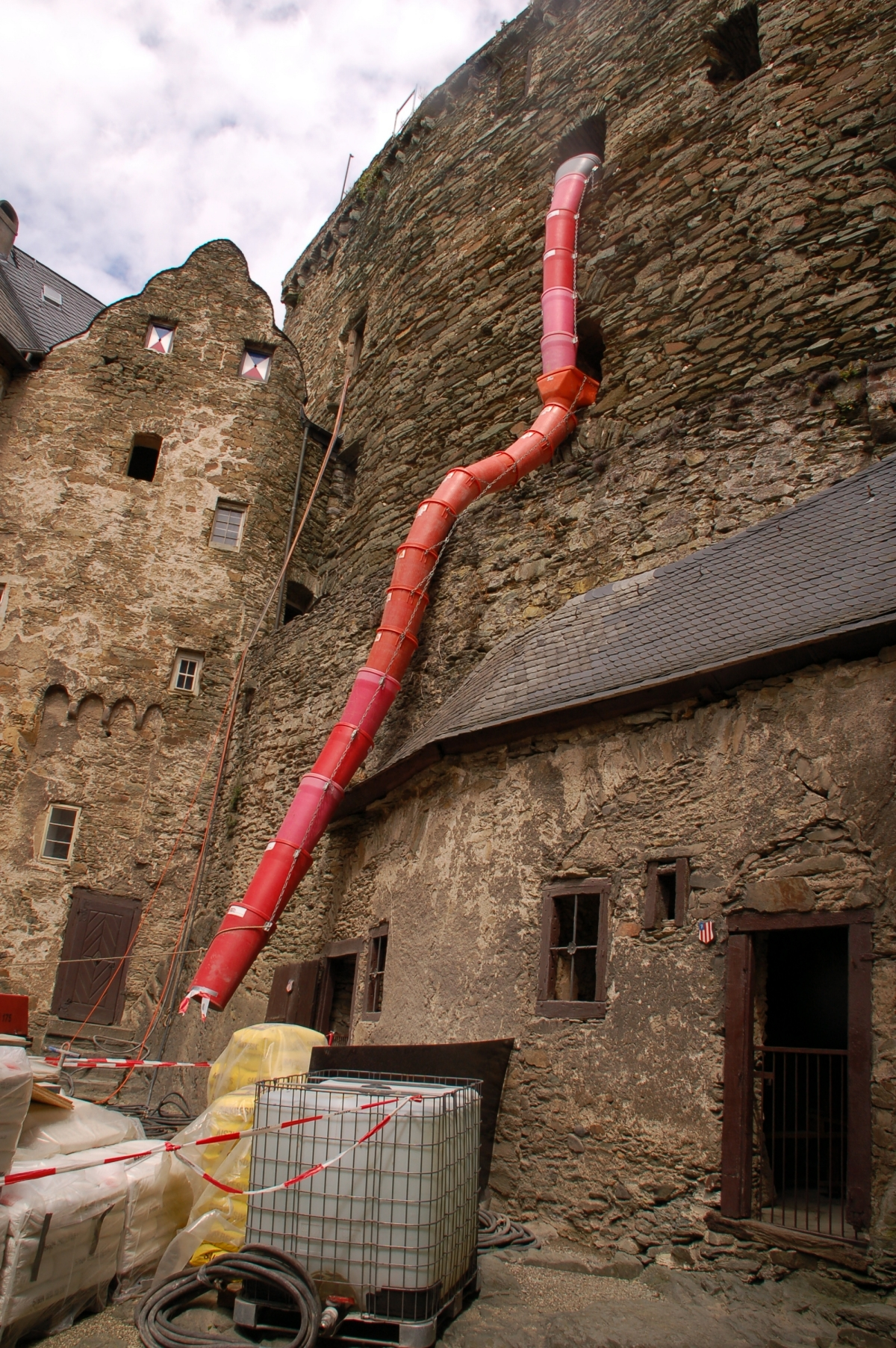 Burg Runkel, Runkel (Lahn), Hessen, Deutschland